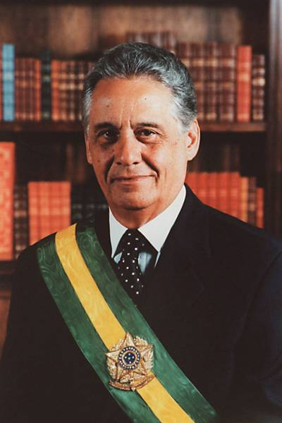 Fernando Henrique Cardoso, presidente do Brasil.